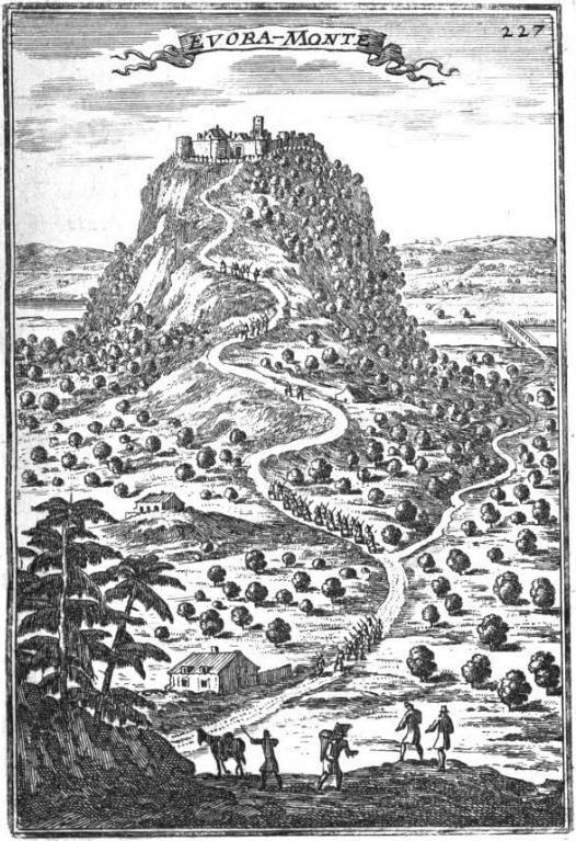 "Avantages et désavantages des places fortes situées sur les rochers et montagnes." "Evora-Monte".